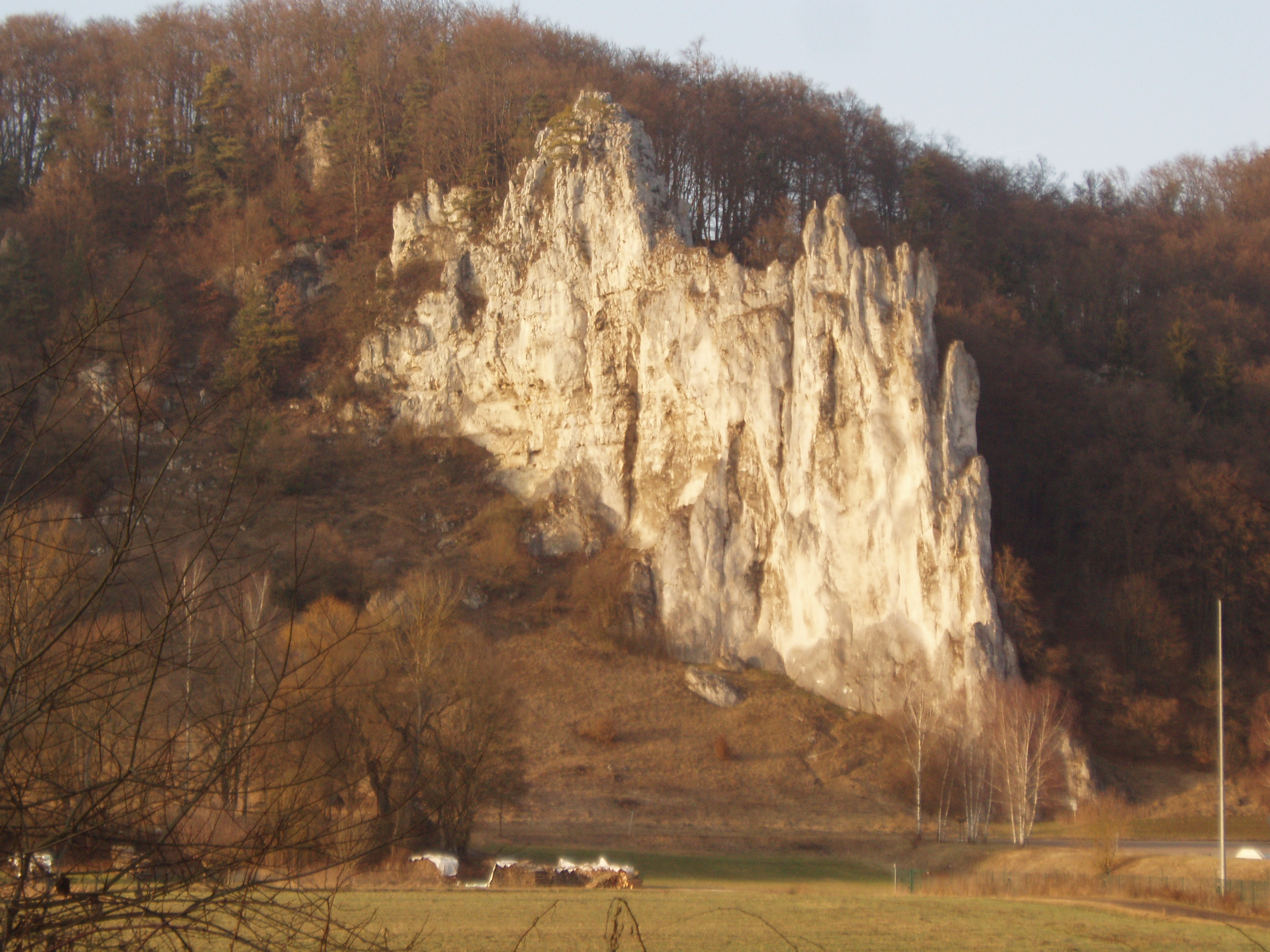 Felspartie in Wellheim-Aicha, Landkreis Eichstätt